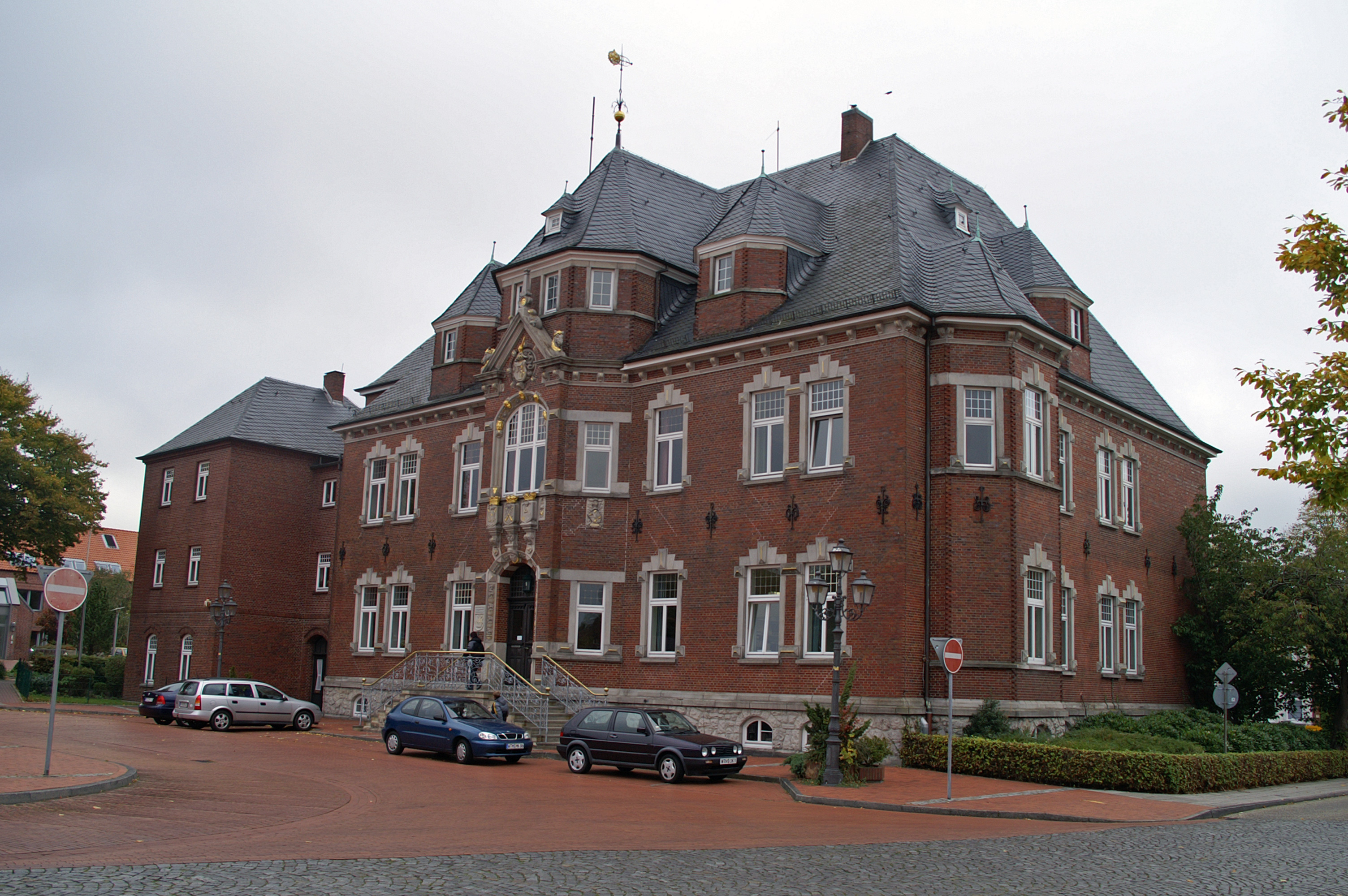 Kreishaus Wittmund, Niedersachsen, Germany